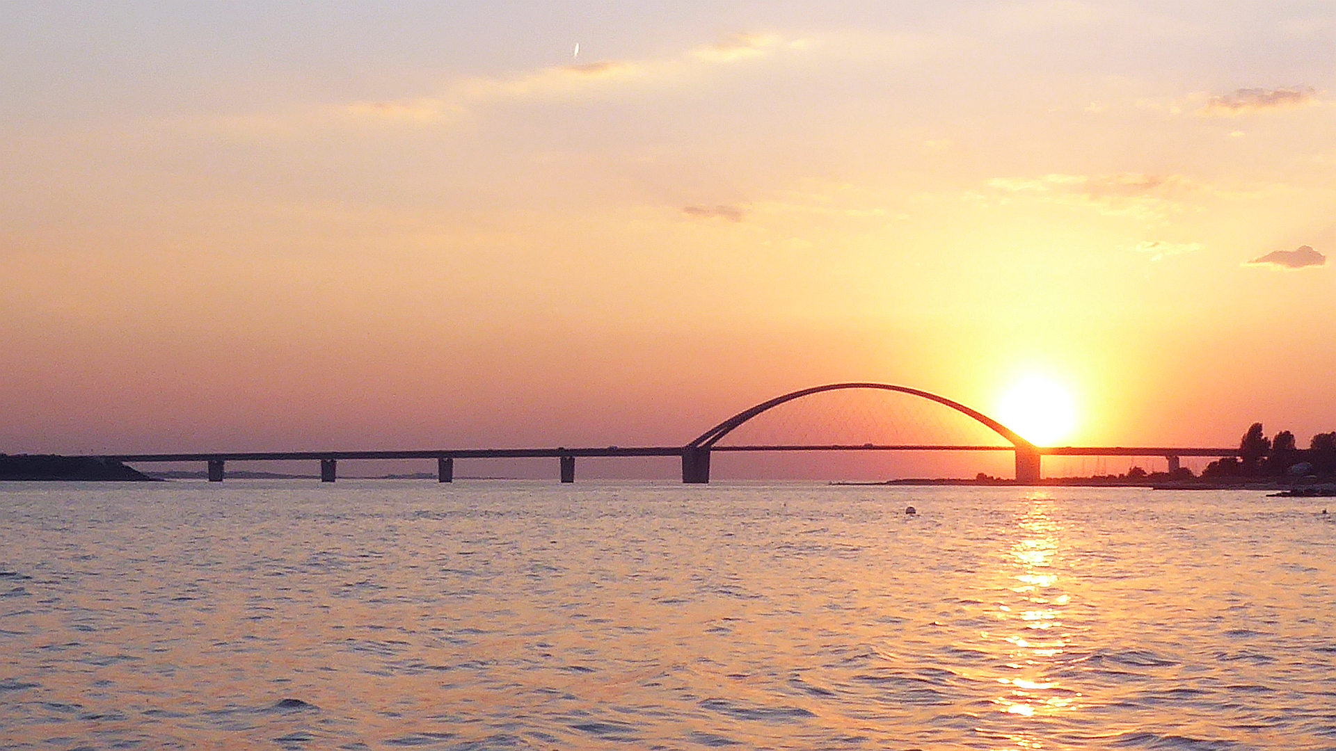 Blick gen Westen über den Fehmarnsund mit Fehmarnsundbrücke im Abendlicht - Foto 2018 © Wolfgang Pehlemann P1270239